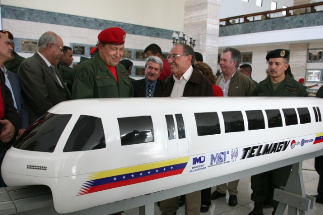 Presentación Telmag al Presidente Chávez